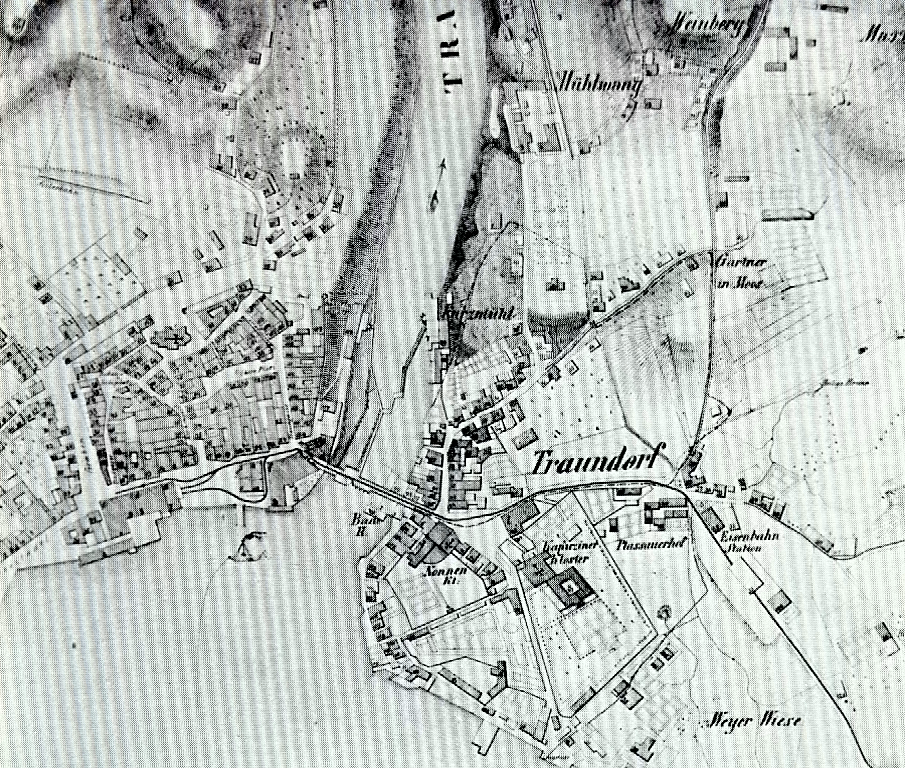 Plan, Gmunden, 1849